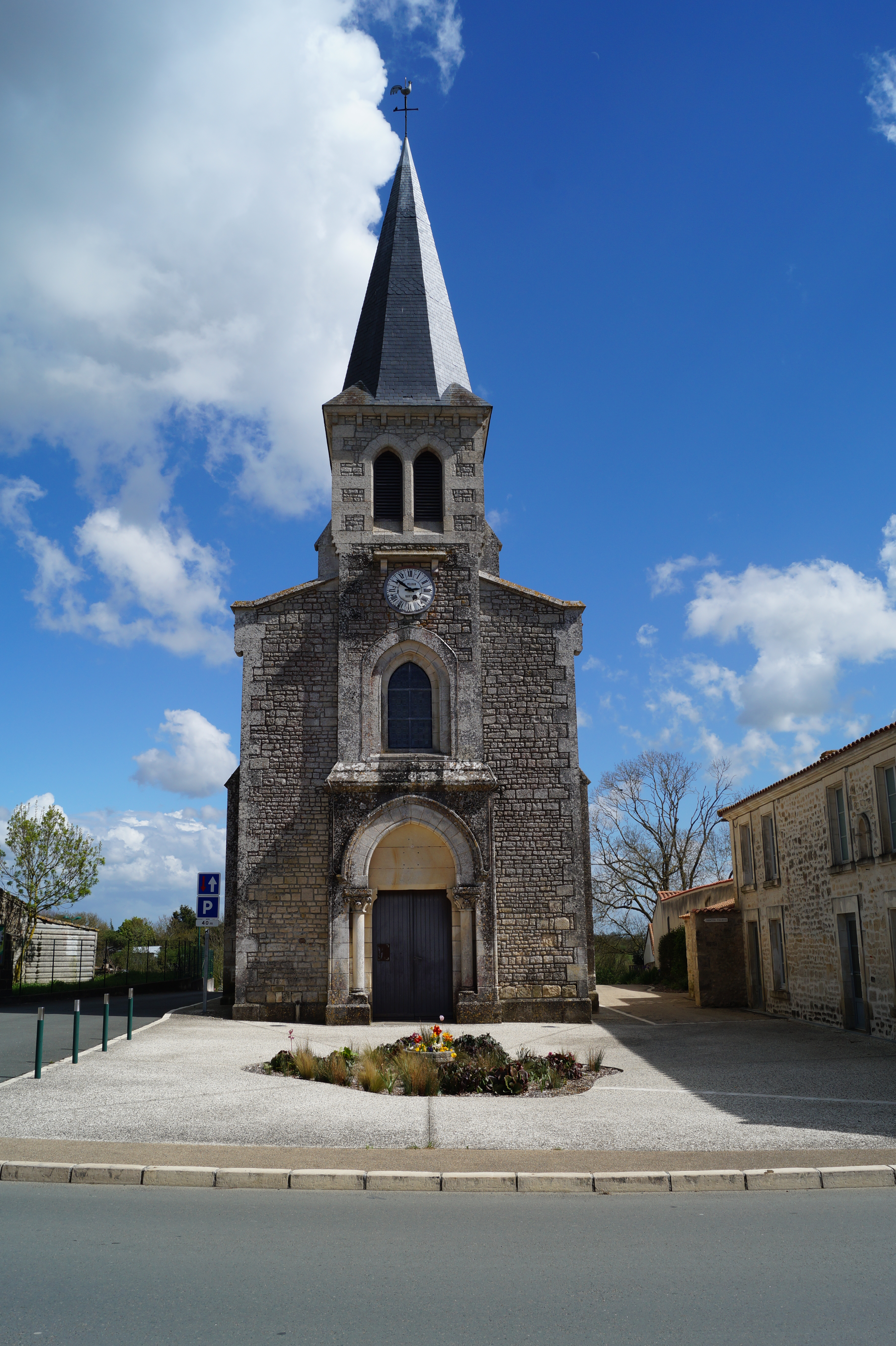 L’église Saint-Pierre de Lairoux depuis la rue Océane.